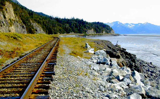 !DSCN1500